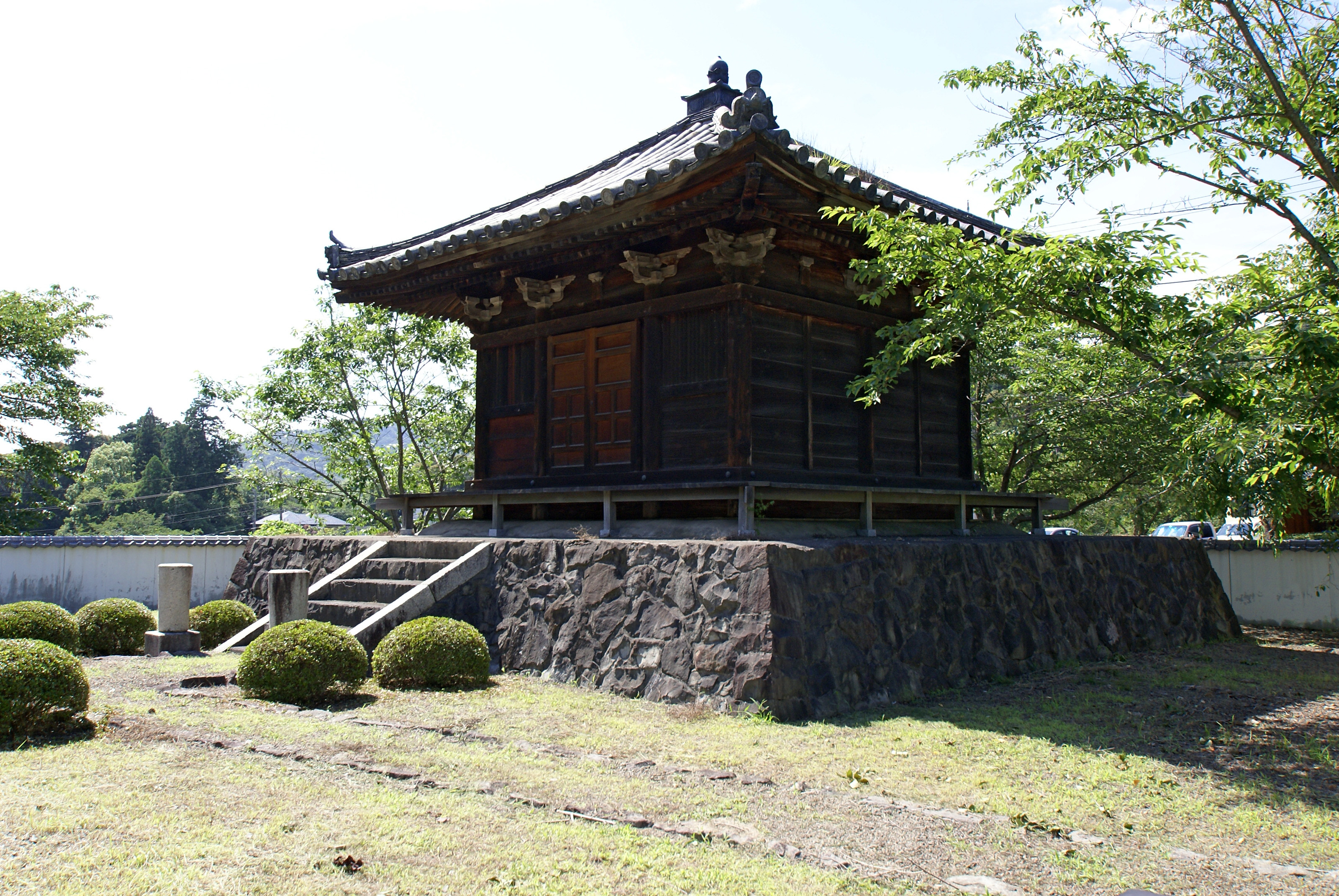 Negoroji in Iwade, Wakayama prefecture, Japan